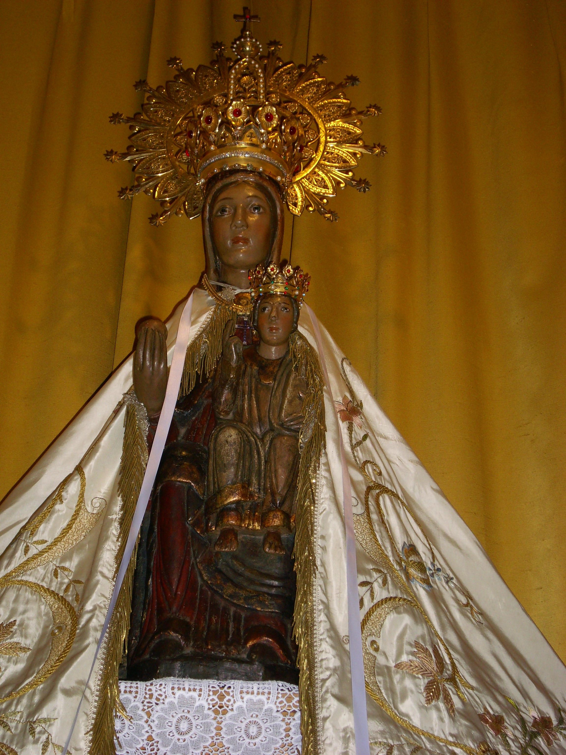 Engalanada